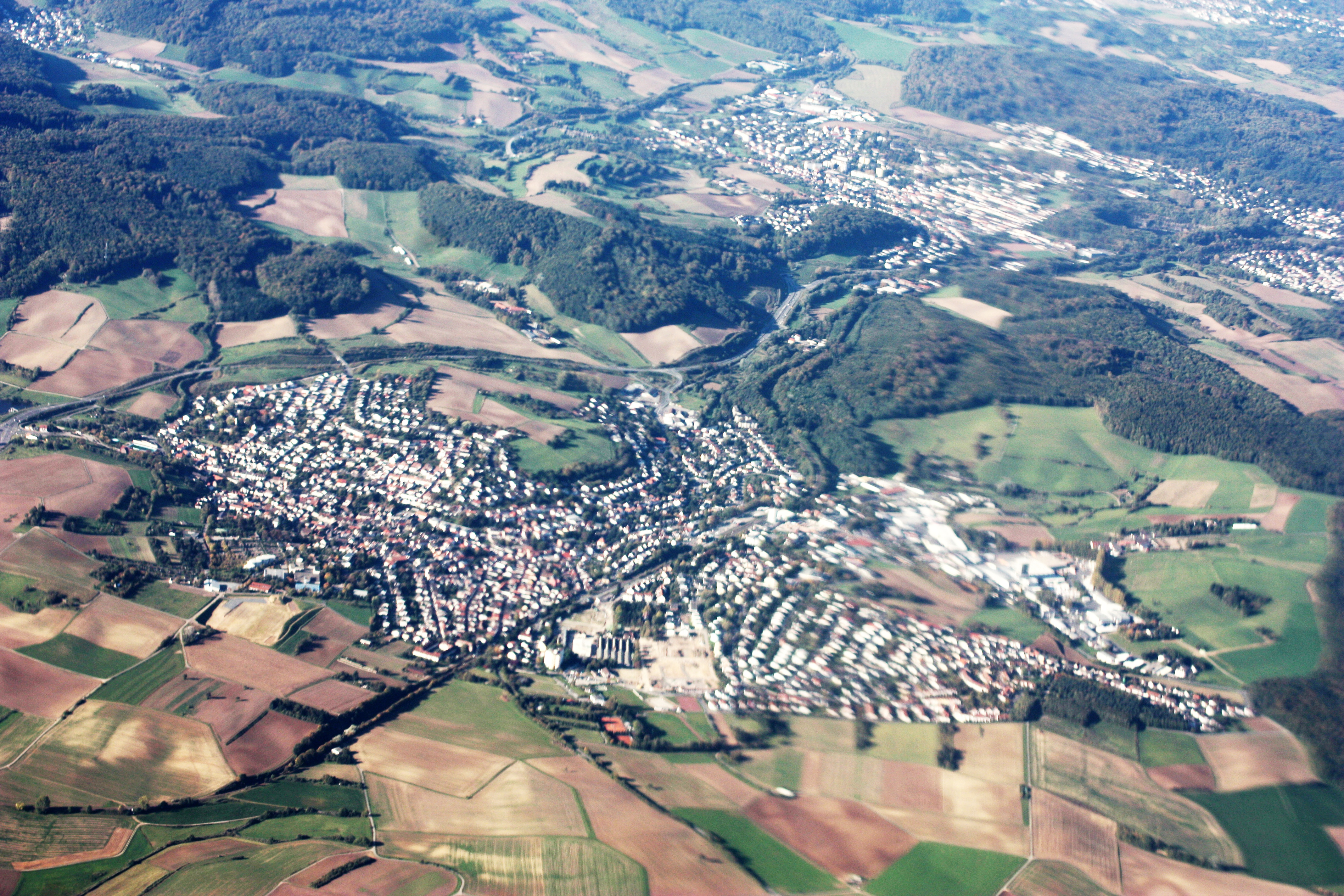 1 Flug von Frankfurt/Main nach Sofia; Start 10:12 MEZ; Landung 13:06 MEZ; Oktober 2010; Ober-Ramstadt mit Nieder-Ramstadt im Hintergrund; ganz oben links: Waschenbach-Mühltal; Blickrichtung nach WSW